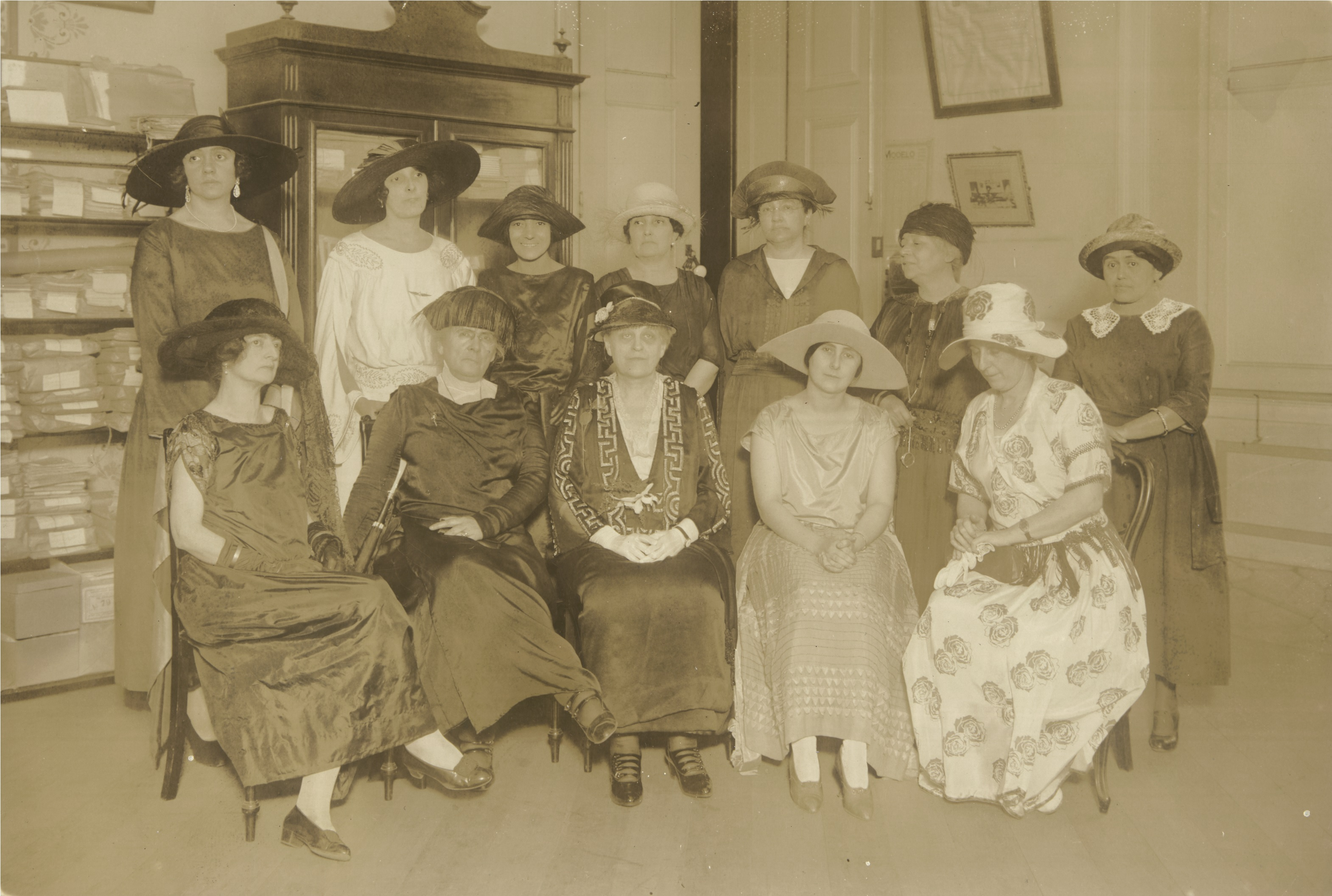 Primeiro Congresso Feminino do Brasil, Rio de Janeiro. Fundo: Federação Brasileira pelo Progresso Feminino.